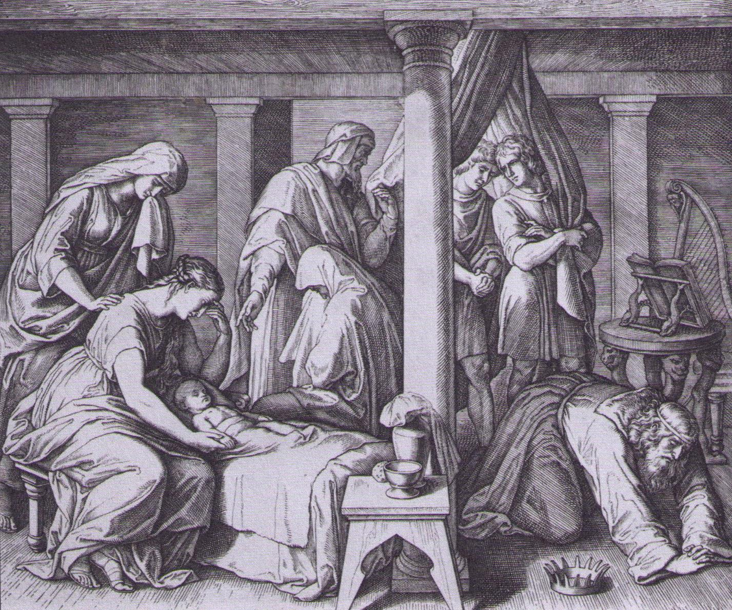 Dawid z dzieckiem Batszeby